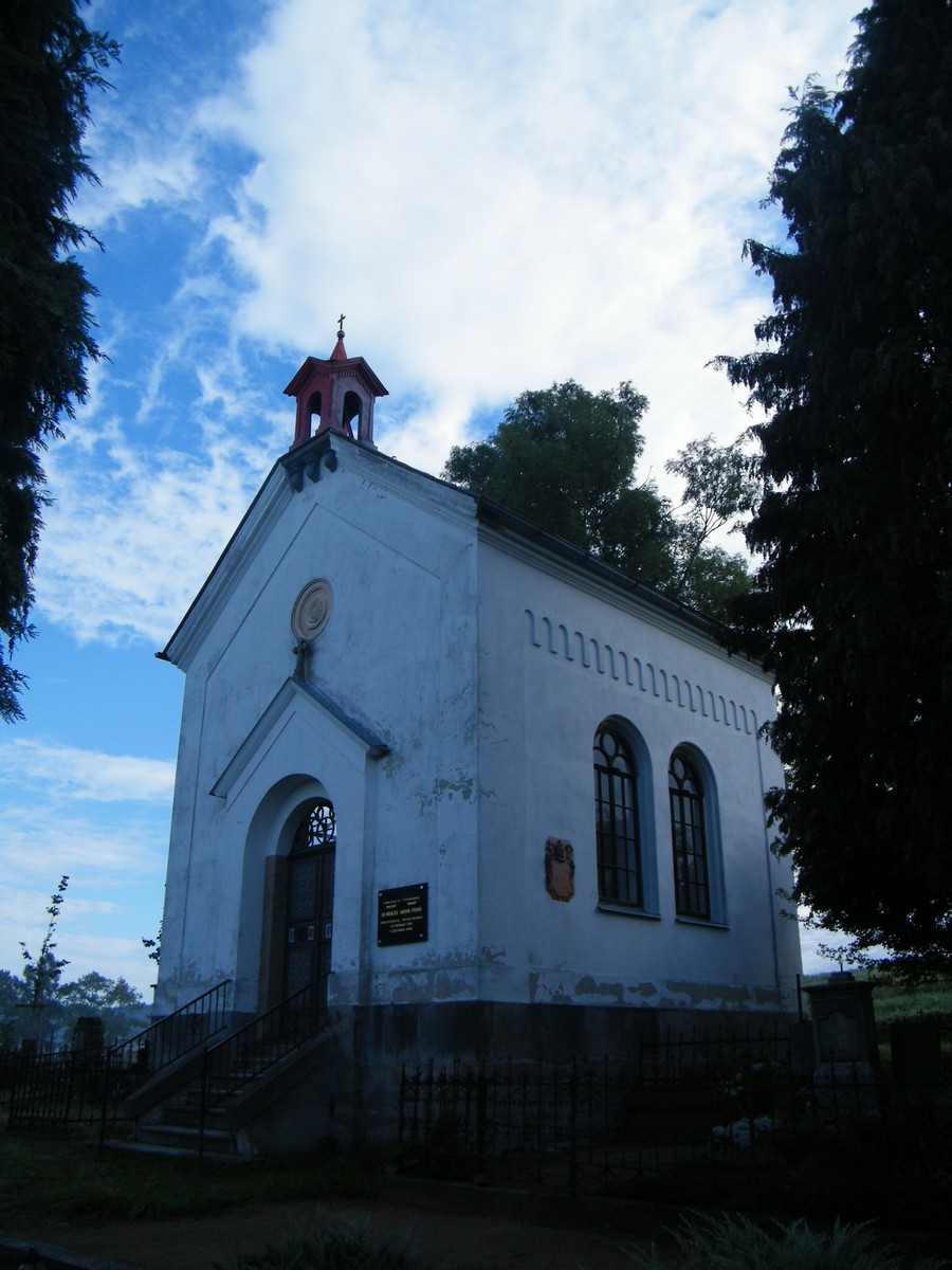 Hřbitovní kaple v Lipové (okres Děčín)